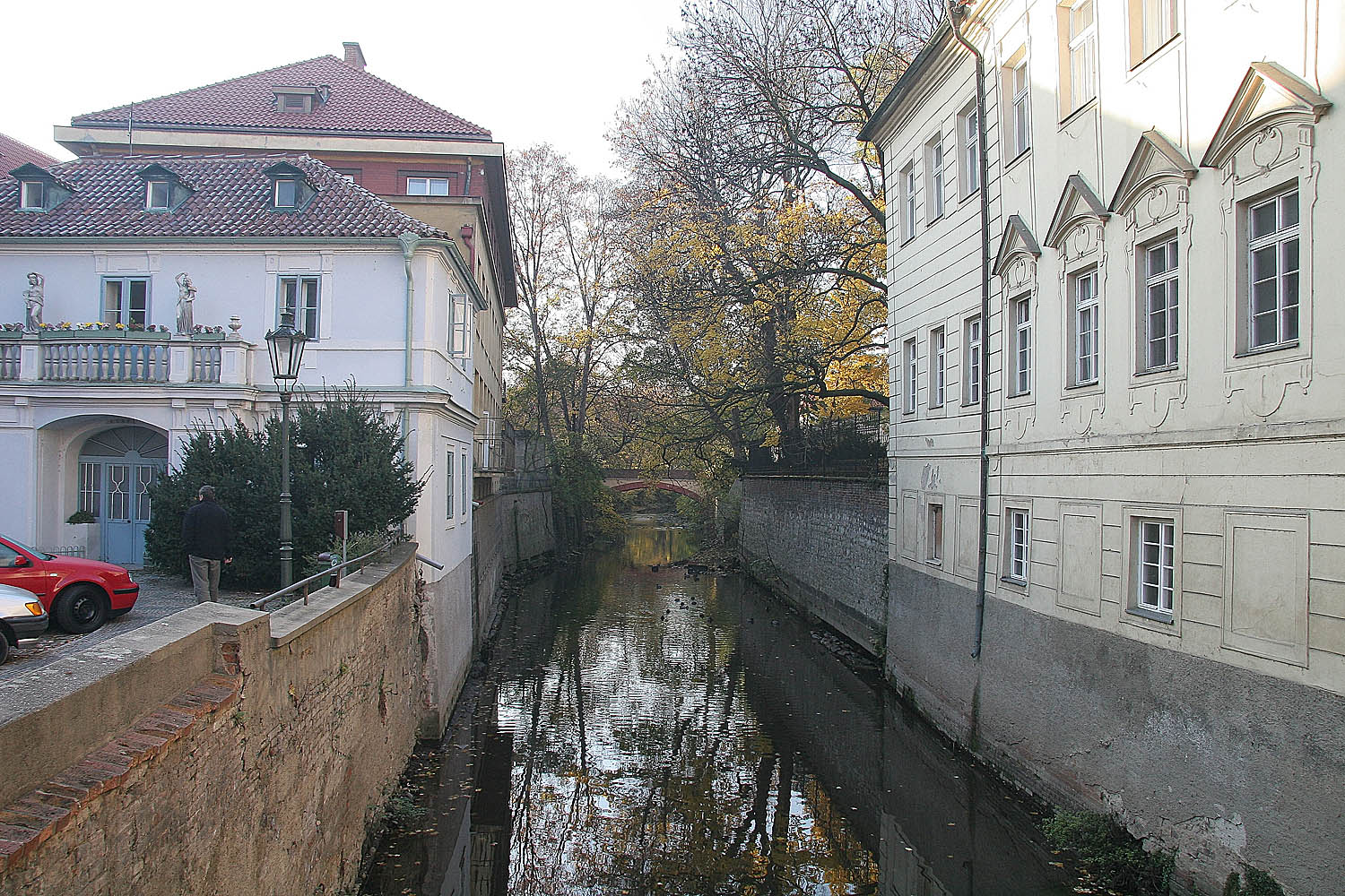 Česky: Praha-Malá Strana, Čertovka, pohled z můstku u Velkopřevorského mlýna proti proudu k předchozímu můstku